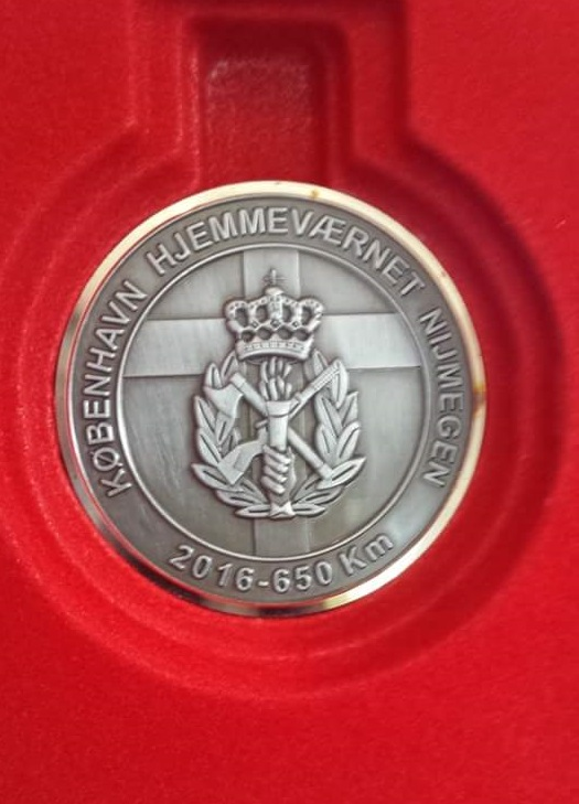 Deltagermedalje for Makoni 2016